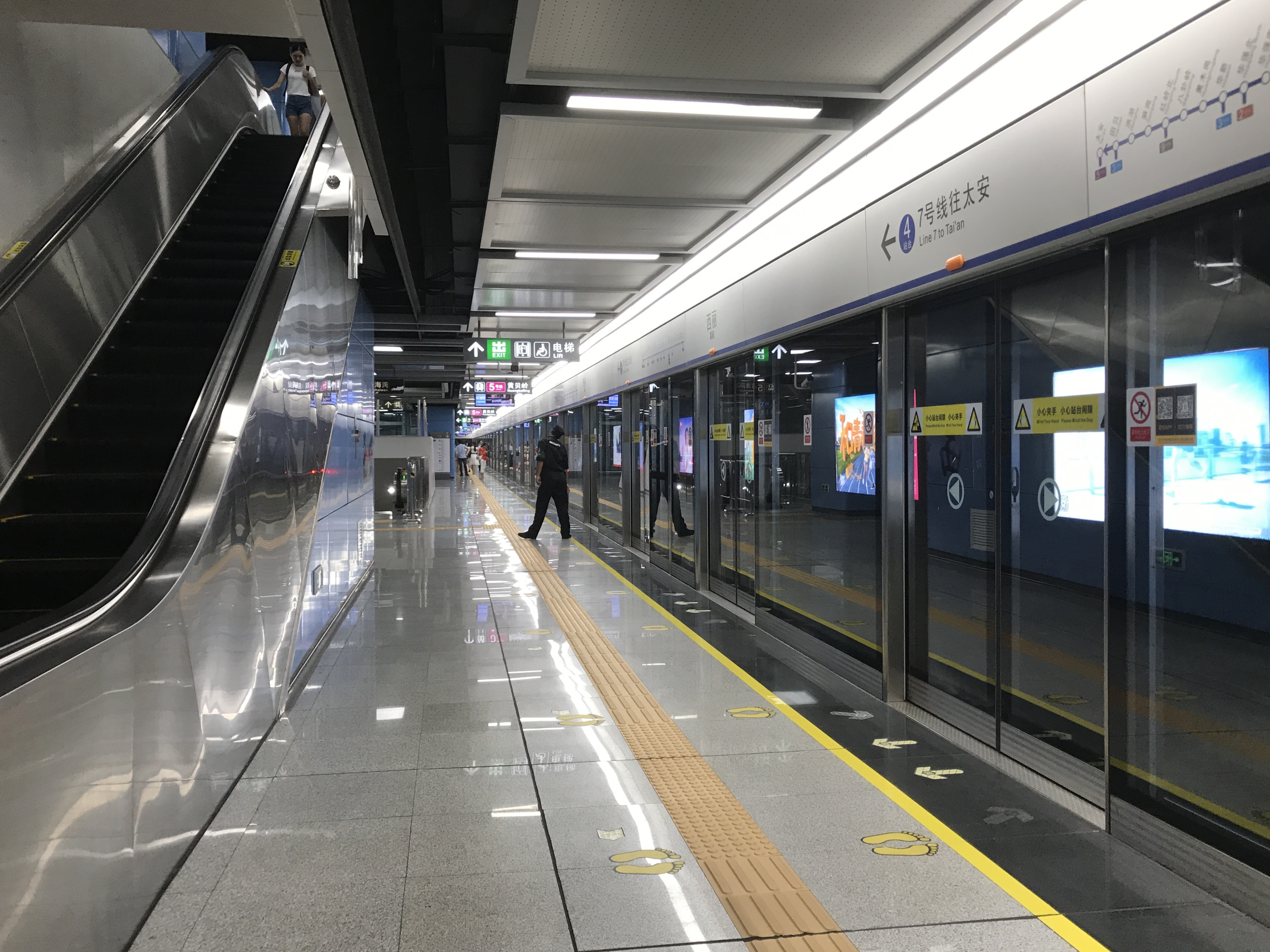 西麗駅(西麗線)のホーム